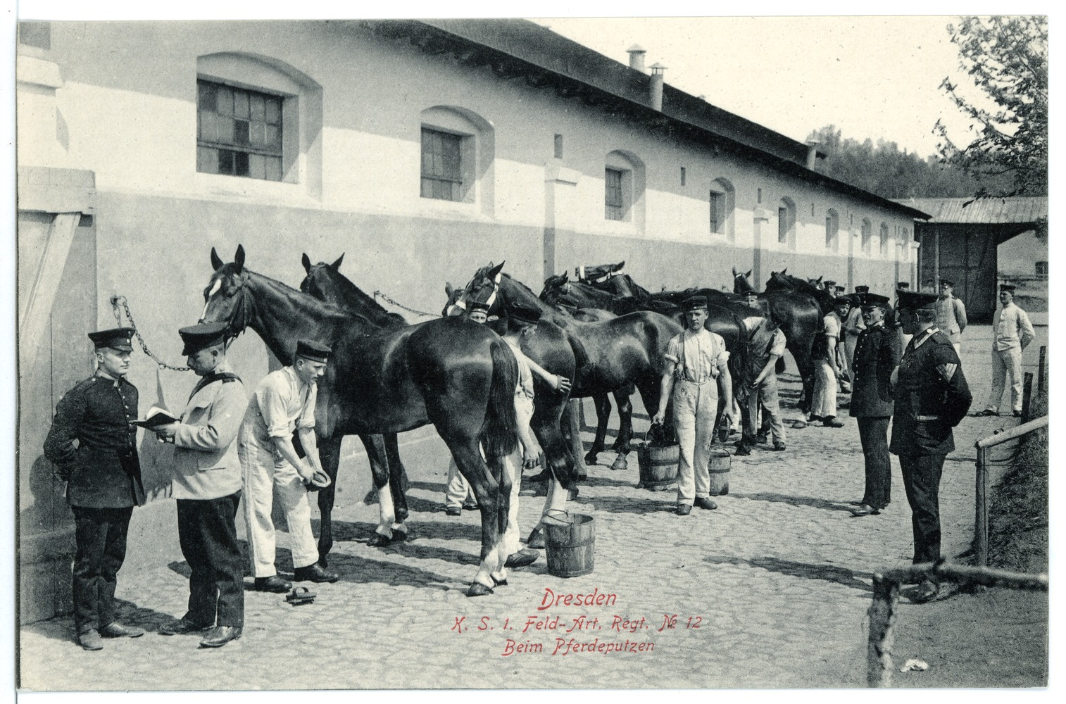 Dresden; 1. Königlich Sächsisches Feld-Artillerie-Regiment Nr. 12 - Pferdeputzen This postcard is from publisher Brück & Sohn in Meißen ( This postcard has a unique number 15711 and is available in a higher resolution at the publisher. This images was uploaded in a cooperation project between Wikipedians and the publisher.